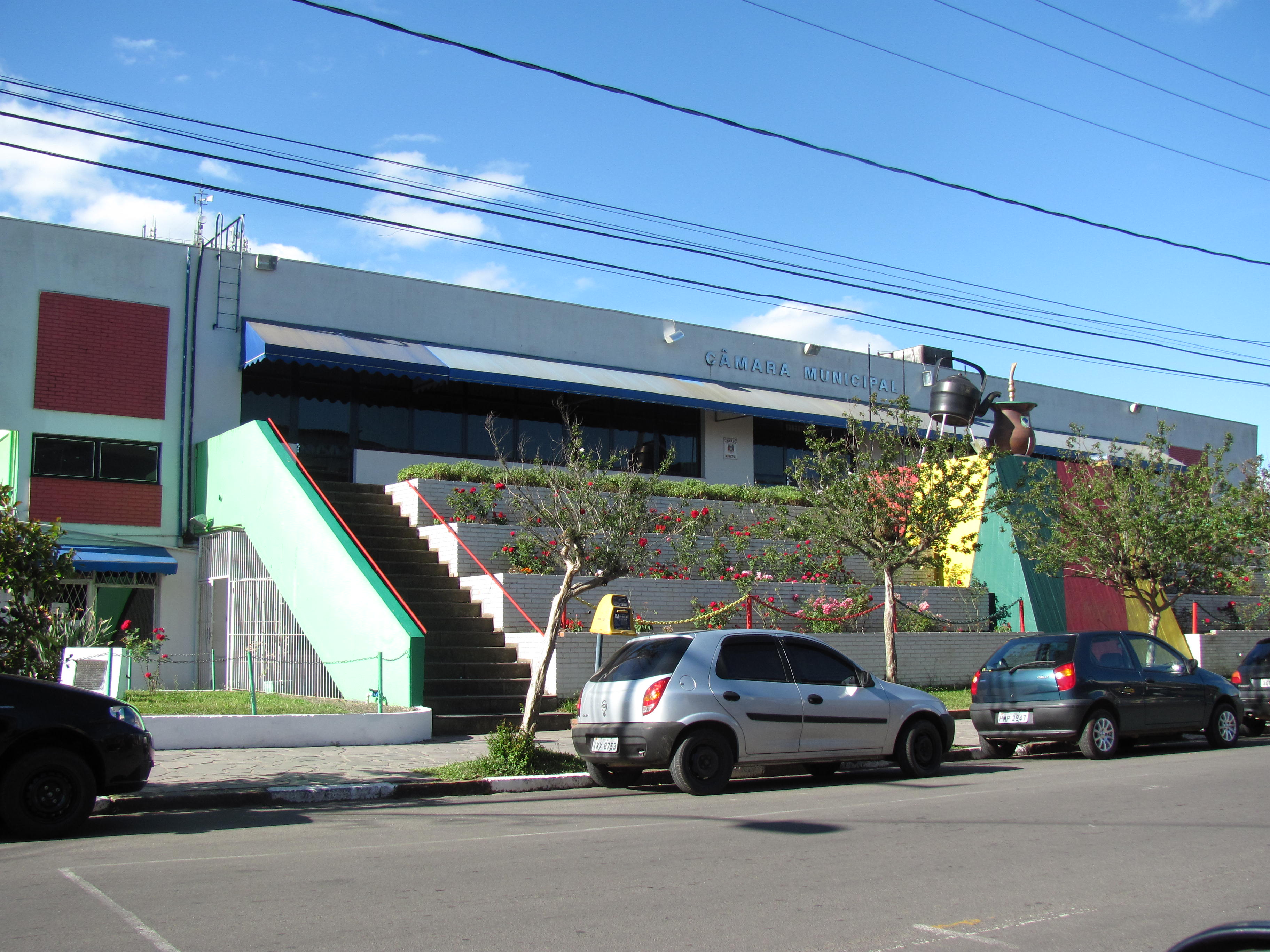 Prédio da Câmara Municipal de Viamão, No andar térreo se localiza a Prefeitura Municipal de Viamão.